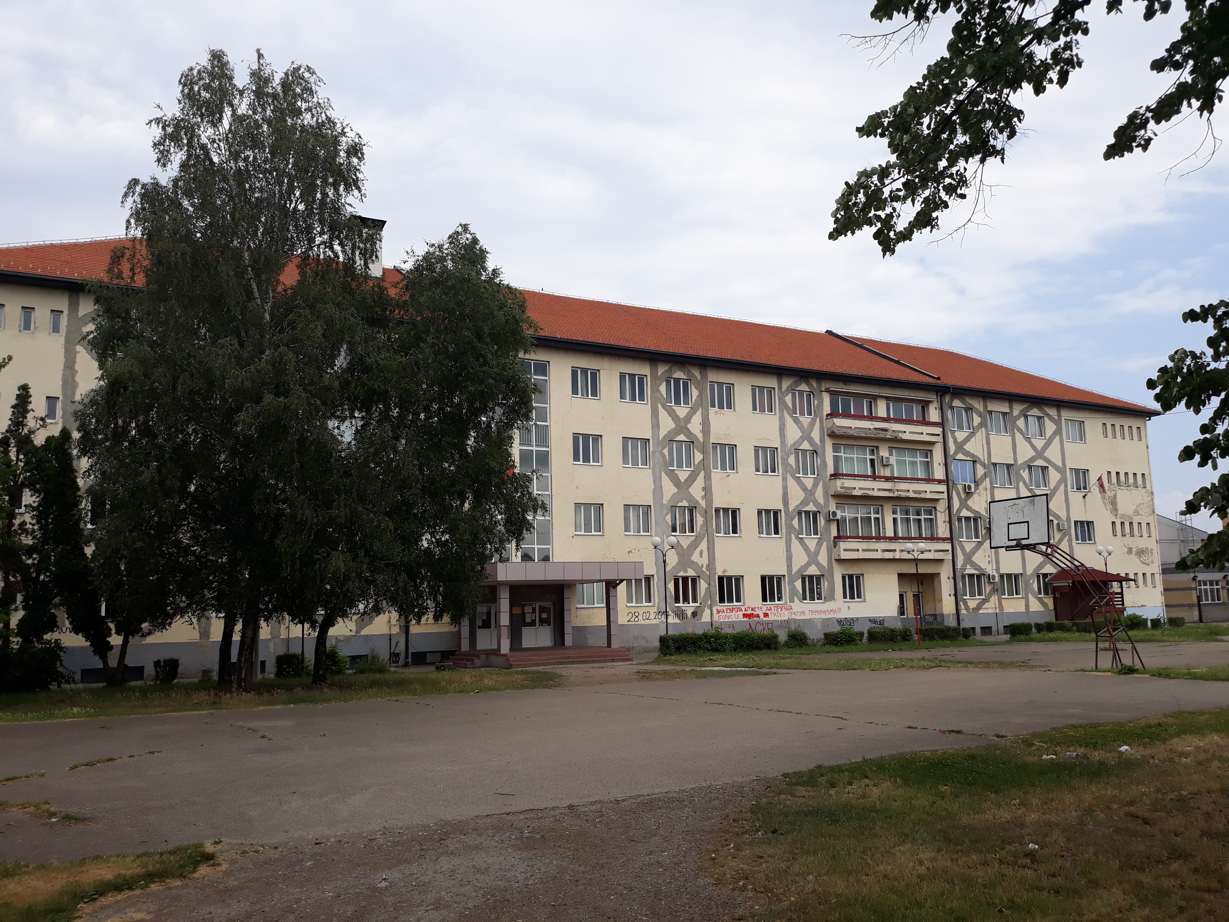 Зграда Гимназије у Краљеву